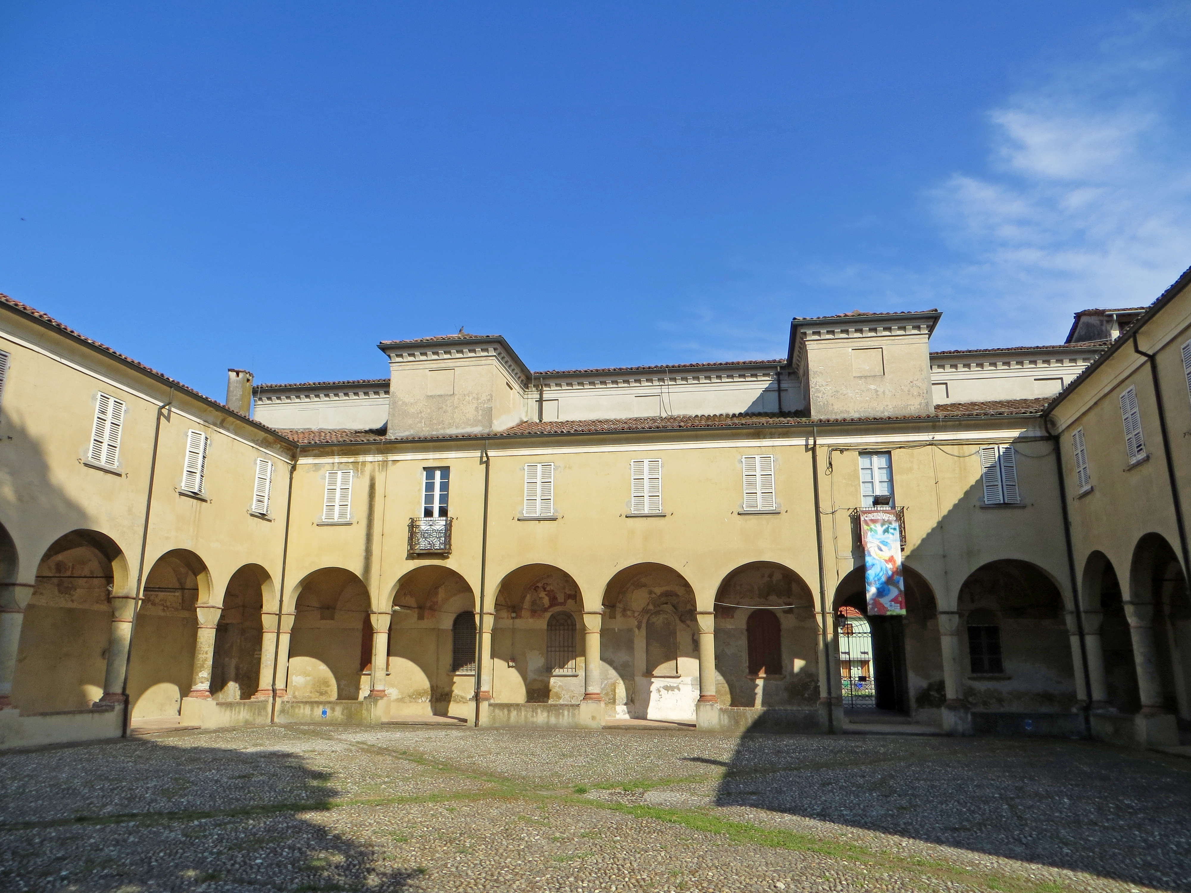 Convento dei Domenicani (Zibello) - lato sud-est del chiostro